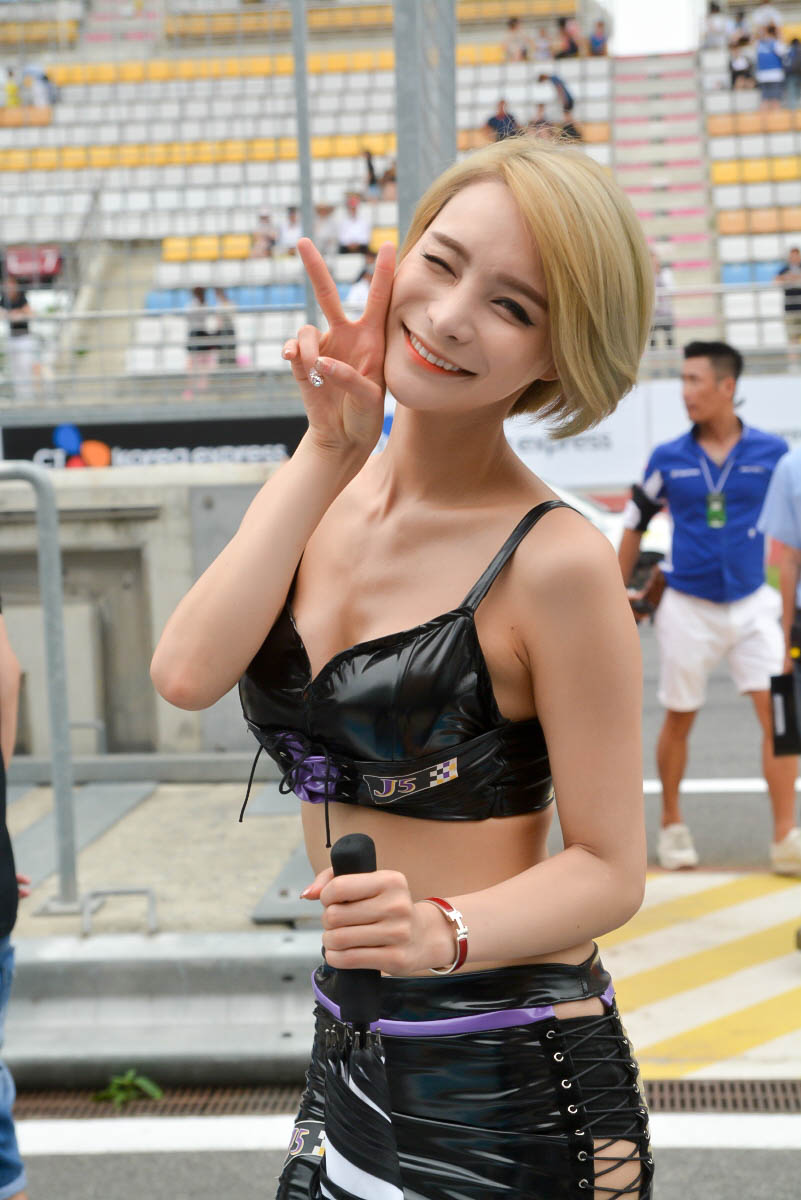 2016 CJ대한통운 슈퍼레이스 4라운드